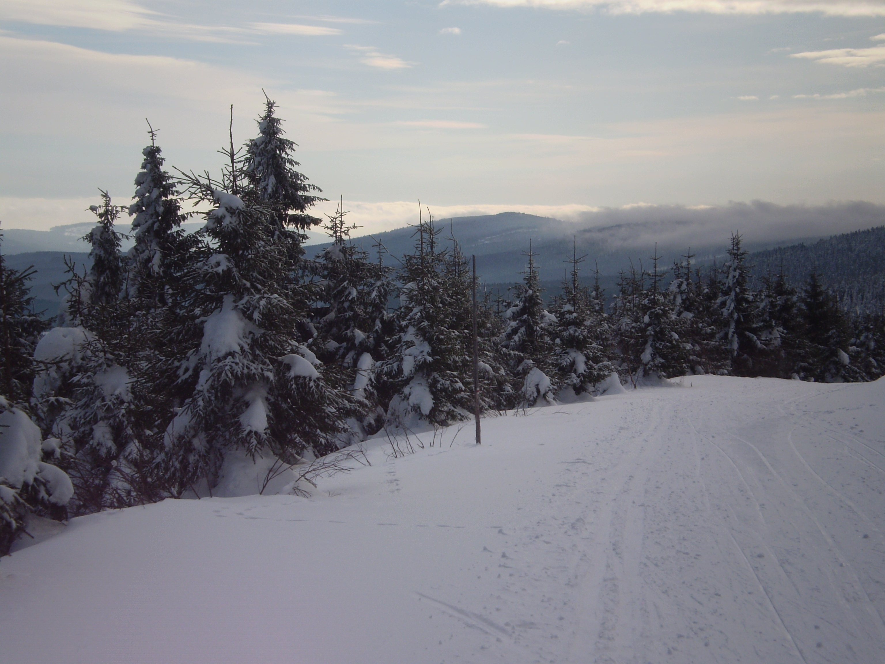 Anenský vrch, Orlické hory